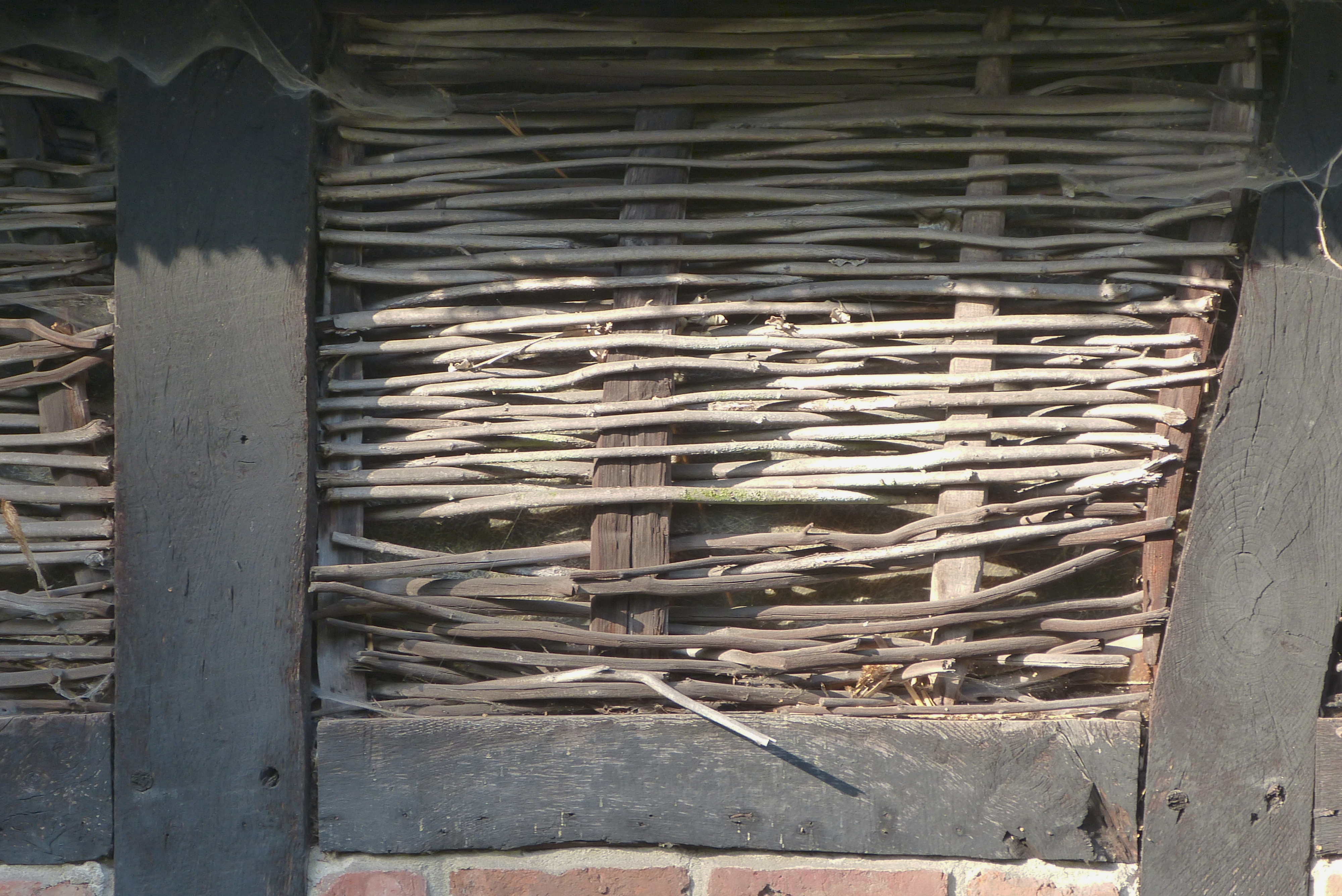 Scheune in Bremen, Im Dorfe 6Das abgebildete Objekt ist ein geschütztes Kulturdenkmal in der Freien Hansestadt Bremen, mit der Nr. 2287 beim Landesamt für Denkmalpflege registriert.